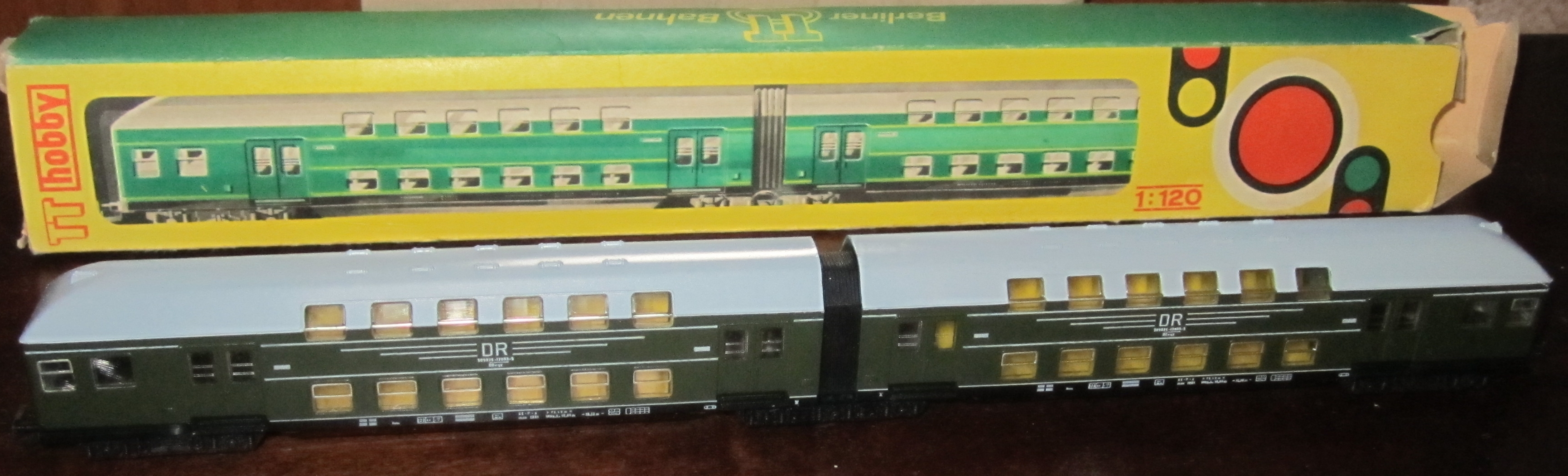 Doppelstockzug der DR in Spur TT.